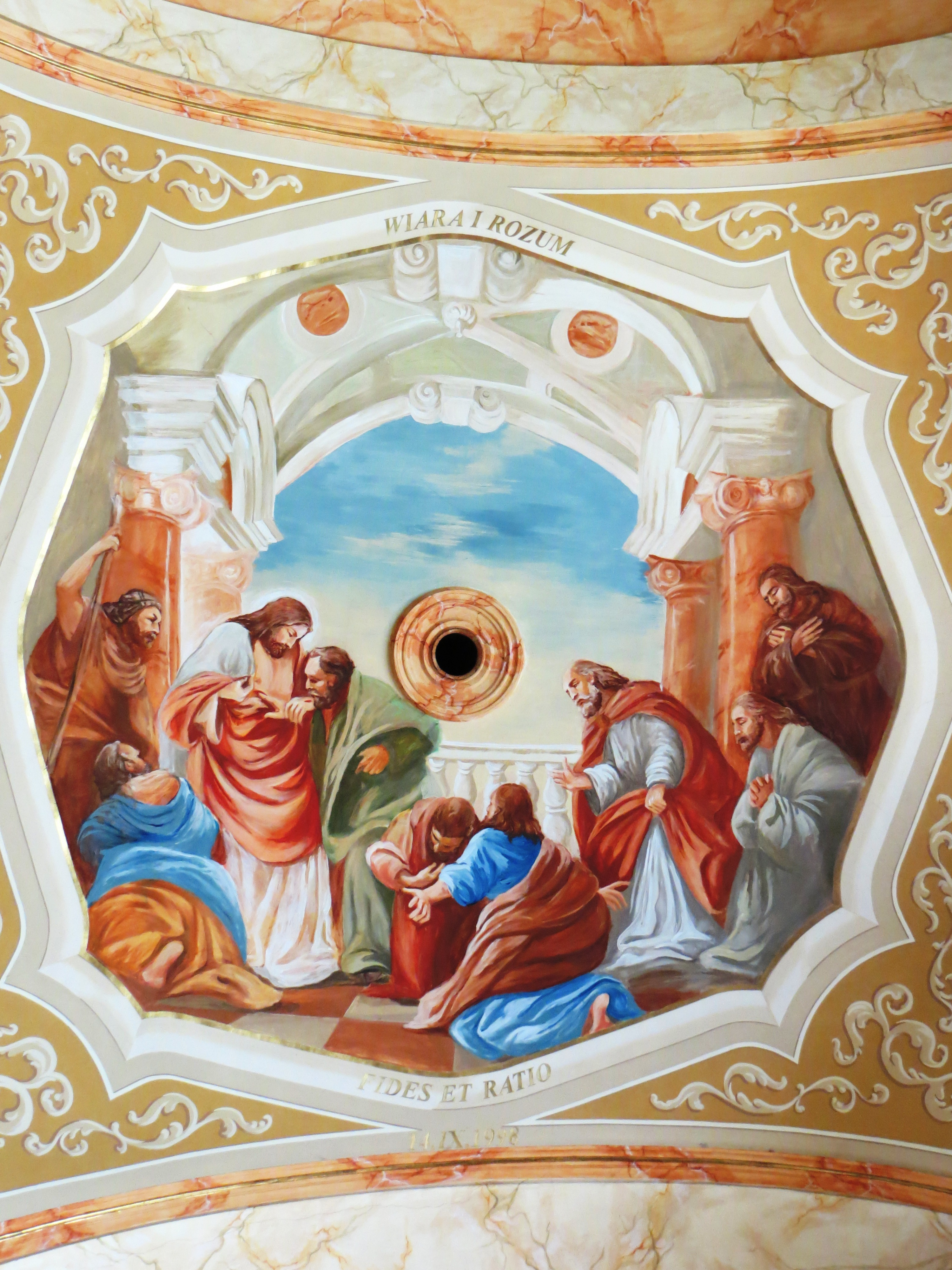 Malowidła na suficie w bazylice ONMP w Wadowicach.